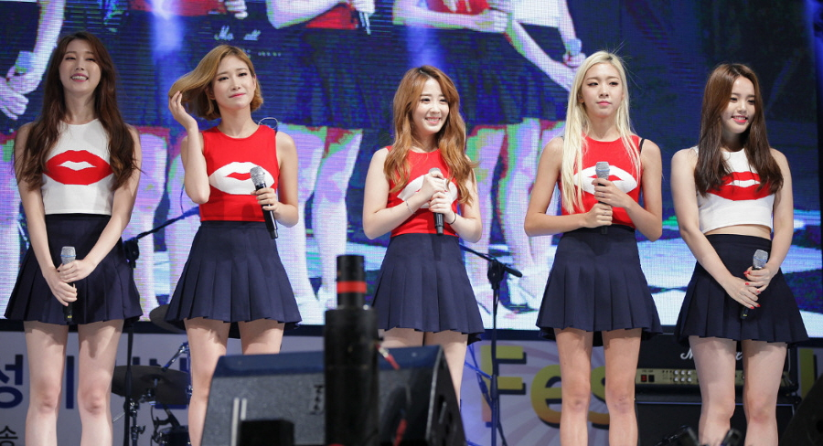 블레이디(Blady) 이상미의뮤직닷컴 공개방송 화성시 우정읍